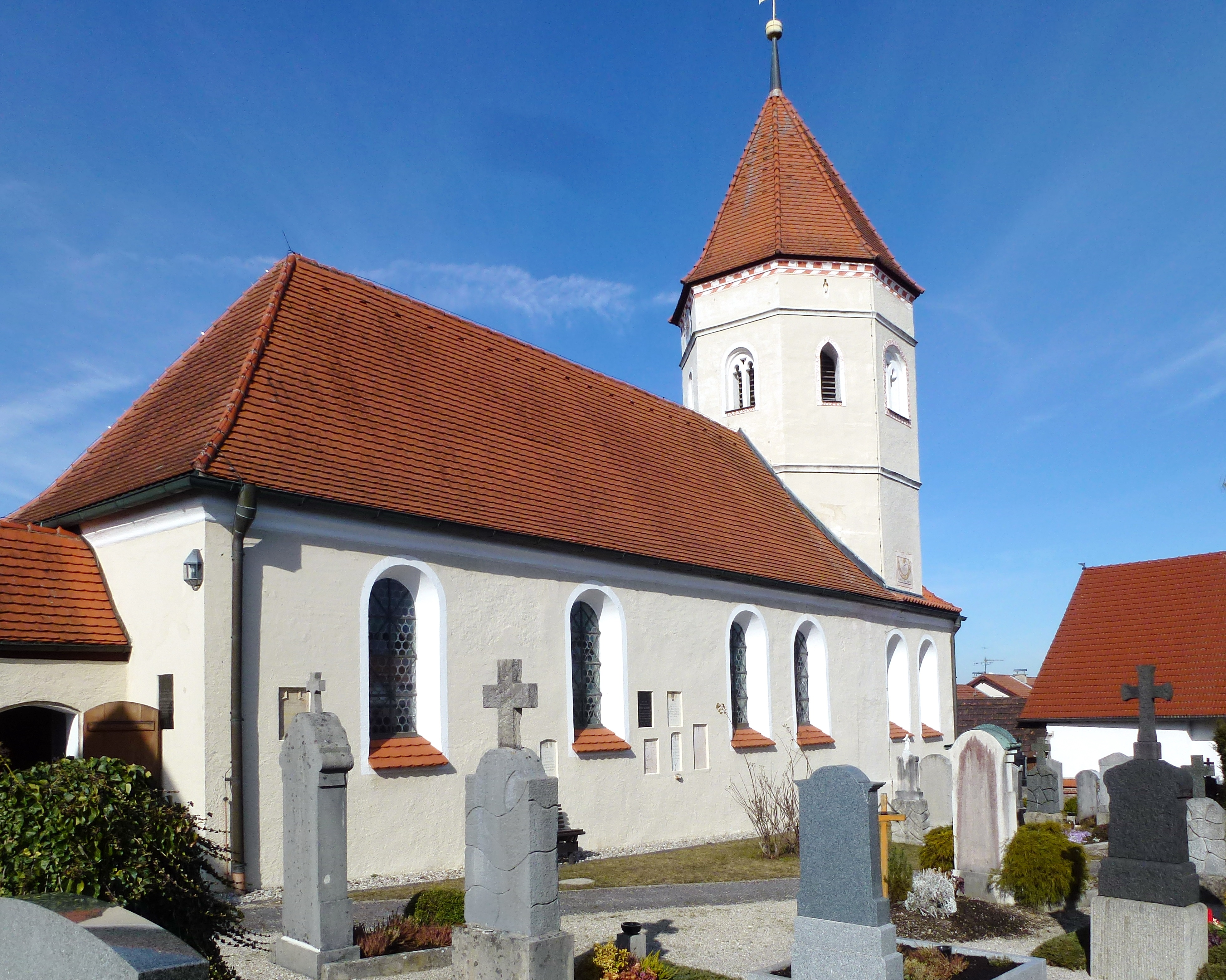 Weßling OT Oberpfaffenhofen, Gautinger Str.44: Katholische Kirche St. Georg, Ansicht von SW